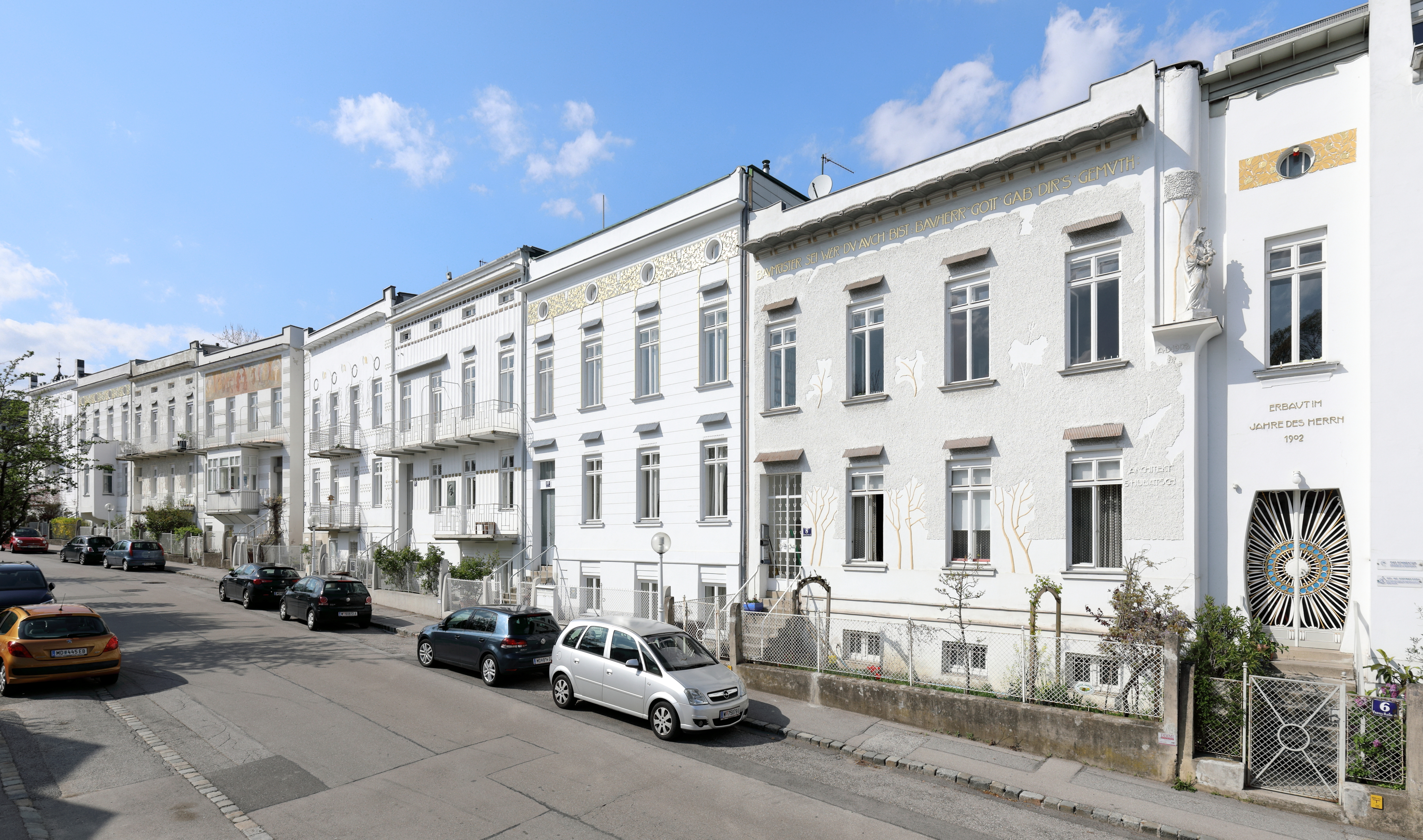 Die Jugendstil-Reihenhaussiedlung Franz Keim-Gasse 4-22 in der niederösterreichischen Marktgemeinde Brunn am Gebirge.Das Ensemble mit 10 Reihenhäusern im Stil der Wiener Secession wurde von 1902 bis 1912 von dem Architekten Sepp Hubatsch errichtet. Diese Jugendstilzeile verkörpert das einheitlichste Ensemble secessionistischer Baugesinnung in Niederösterreich.